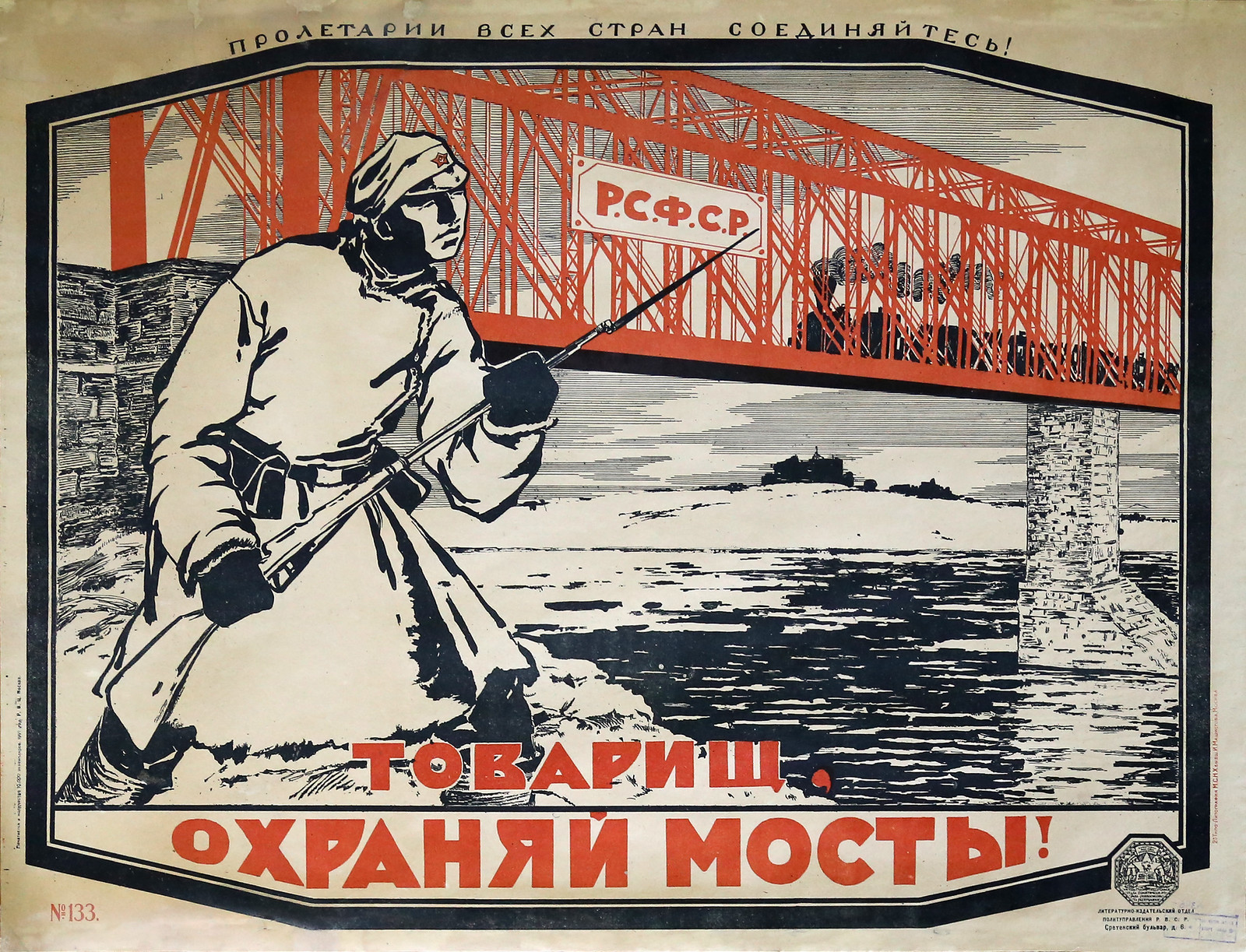 Спасский. Товарищ, охраняй мосты.jpg